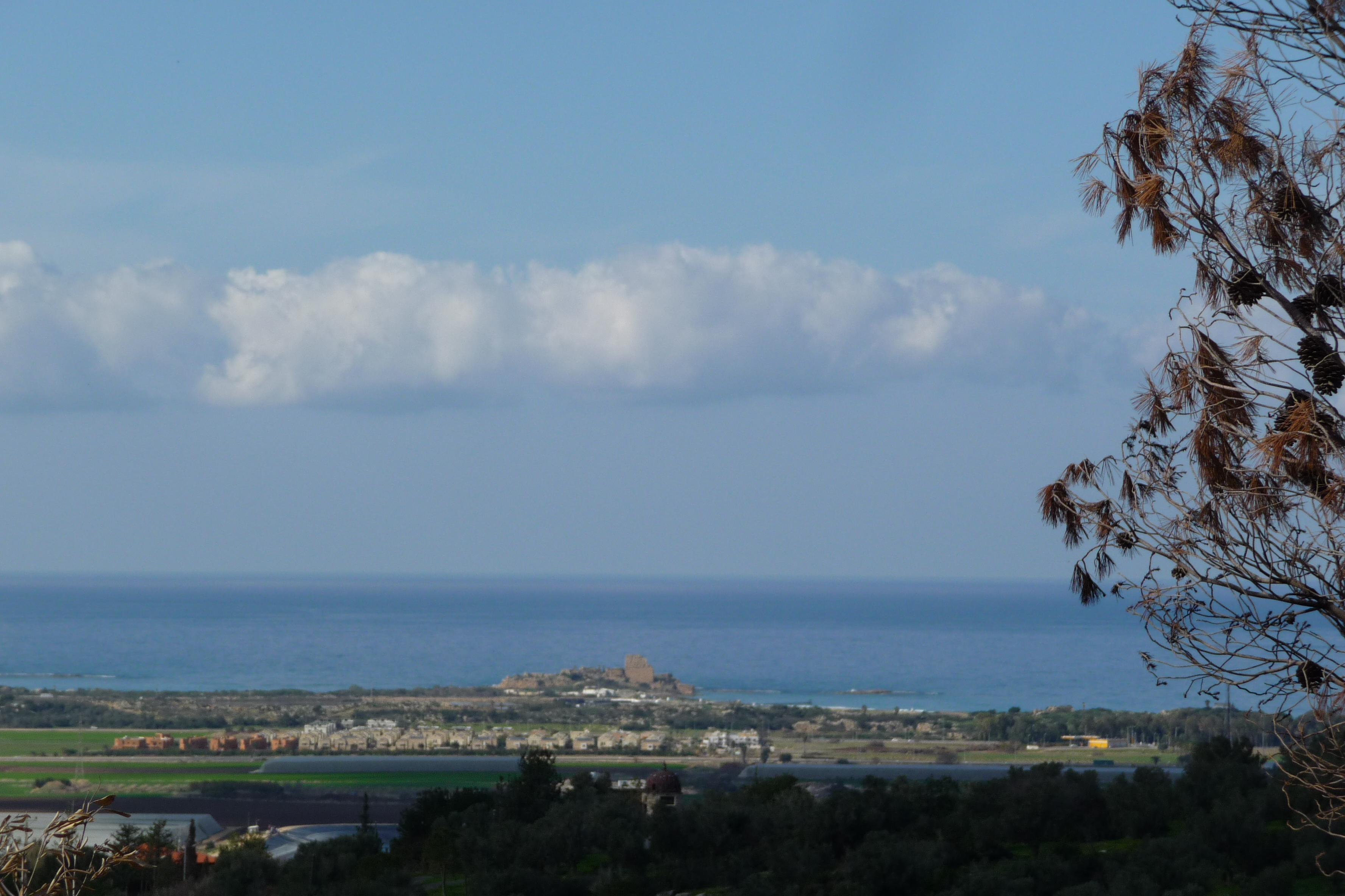 מבצר עתלית (ידוע גם כמבצר פרגרינורום (Castellum peregrinorum) או טירת פֶּלֶרֶן (Château Pèlerin)) הוא אתר ארכאולוגי ובו מבצר צלבני. האתר נמצא סמוך ליישוב עתלית שבמישור החוף, והוא היה מקום מושבם של אחרוני הצלבנים בארץ ישראל, לפני שנטשו את ממלכתם והפליגו אל מעבר לים.